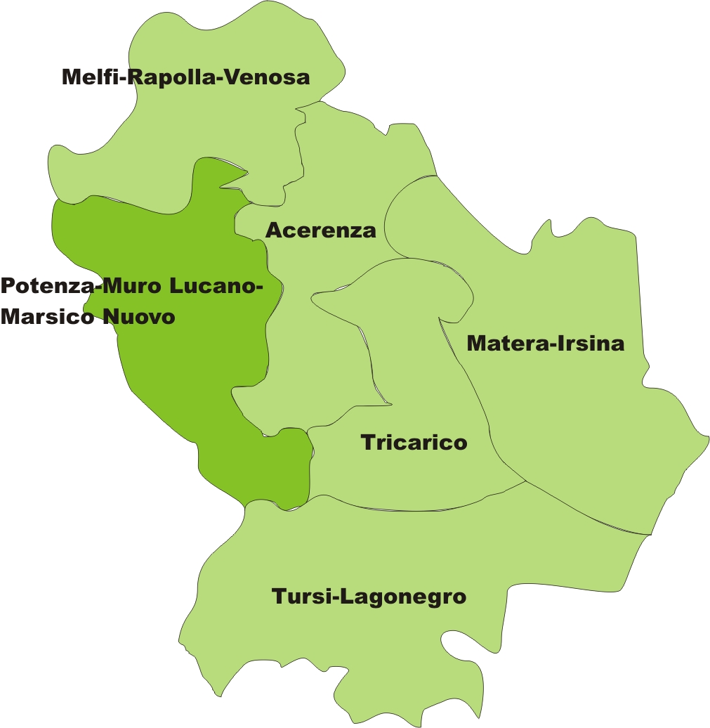 Mapa de la regió eclesiàstica Basilicata